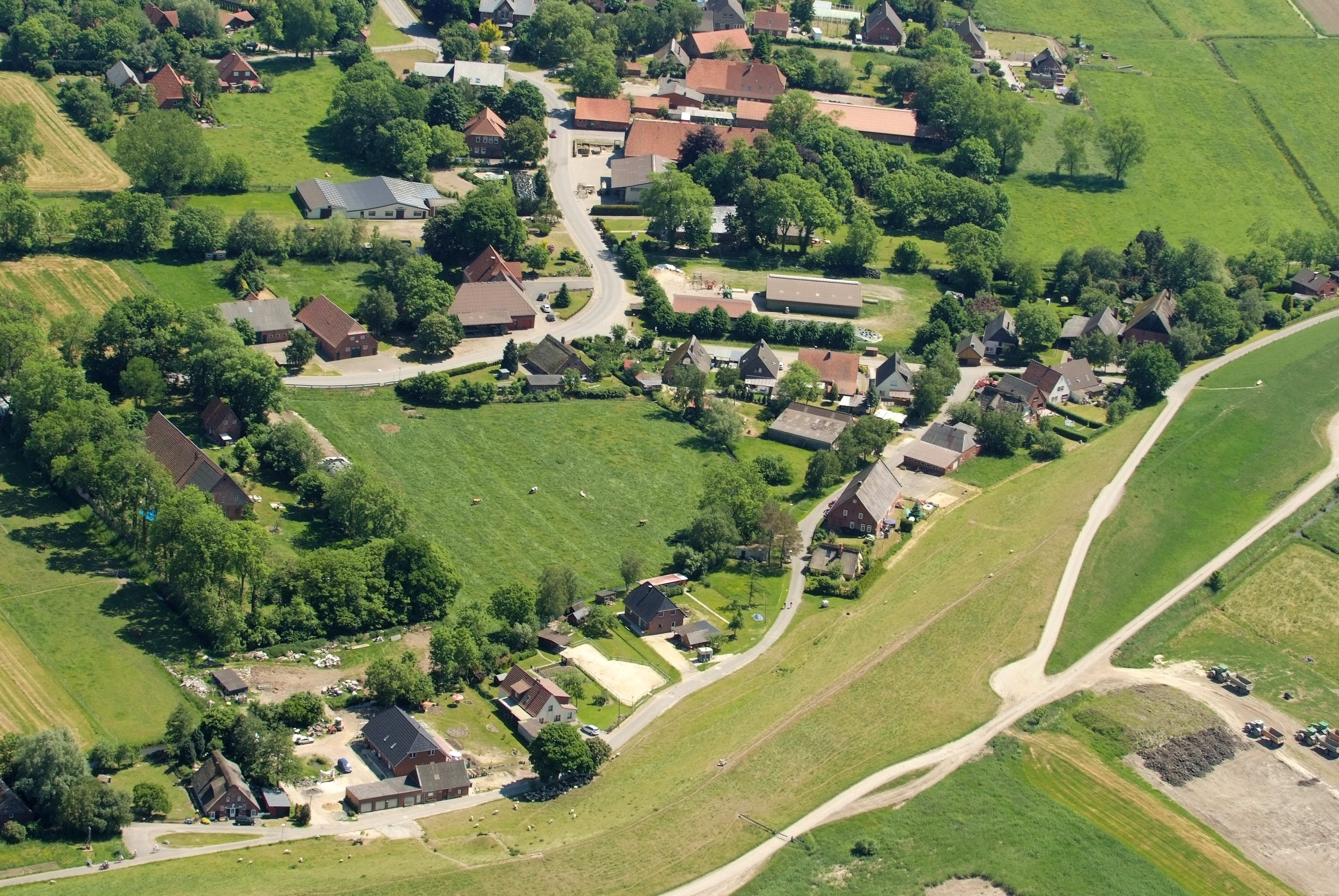 Offenwarden, Ortsteil von Sandstedt, rechts der Weserdeich (Gruppendenkmal 35.204.900.047) (Fotoflug vom Flugplatz Nordholz-Spieka über Cuxhaven und Wilhelmshaven)